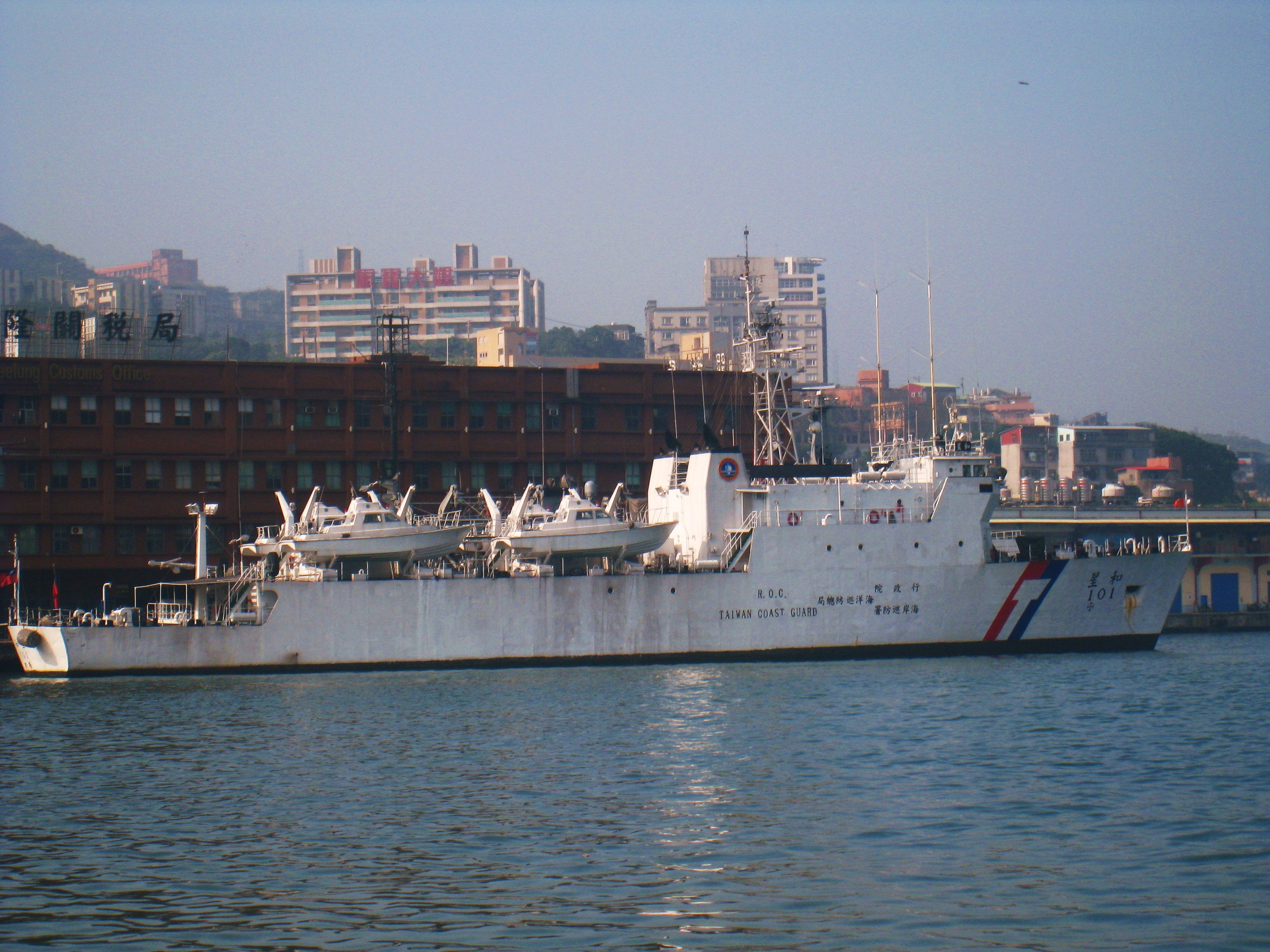 行政院海岸巡防署海洋巡防總局巡防艦和星（CG-101）停泊於基隆關稅局前。